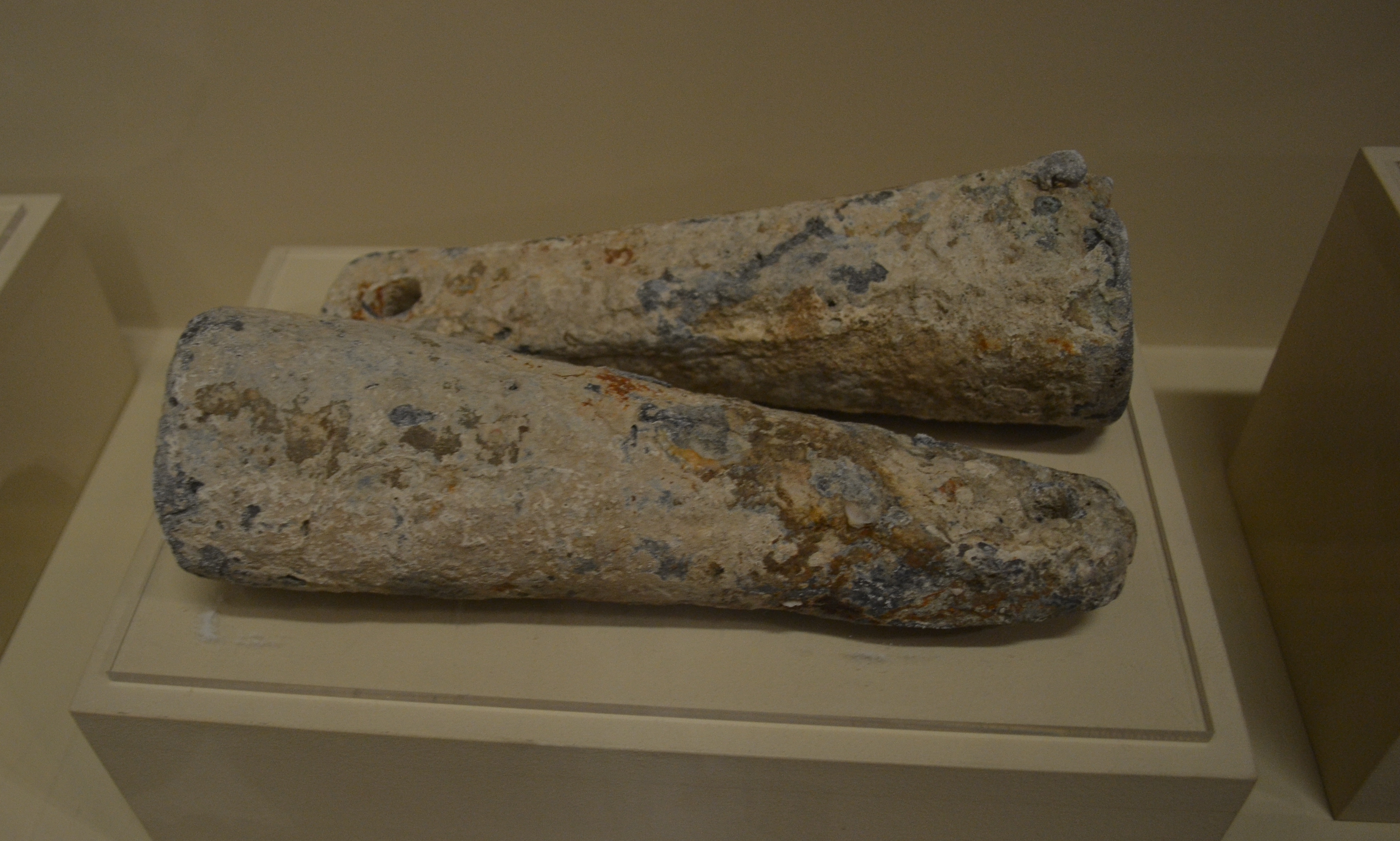 Escandallos de plomo para medir la profundidad del mar donde se encontraba el barco. La oquedad se rellenaba de sebo para que se adhiriera la arena o grava y conocer así la calidad del fondo. Museo Naval de Madrid.